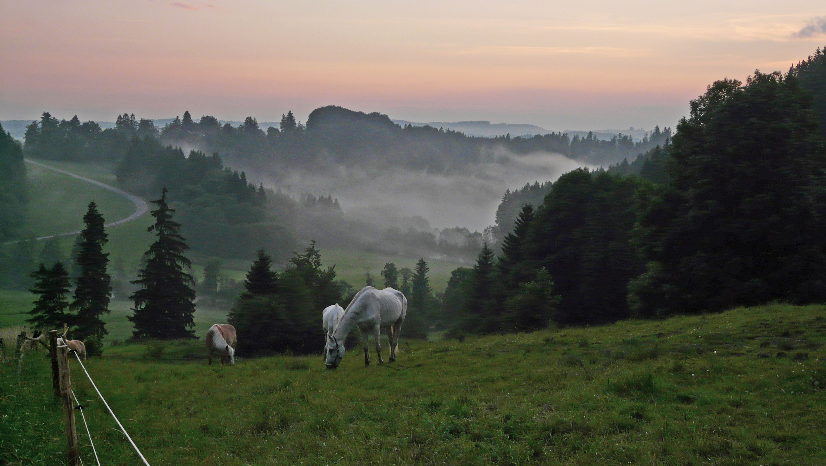 Wertachschlucht bei Wald, Ostallgäu